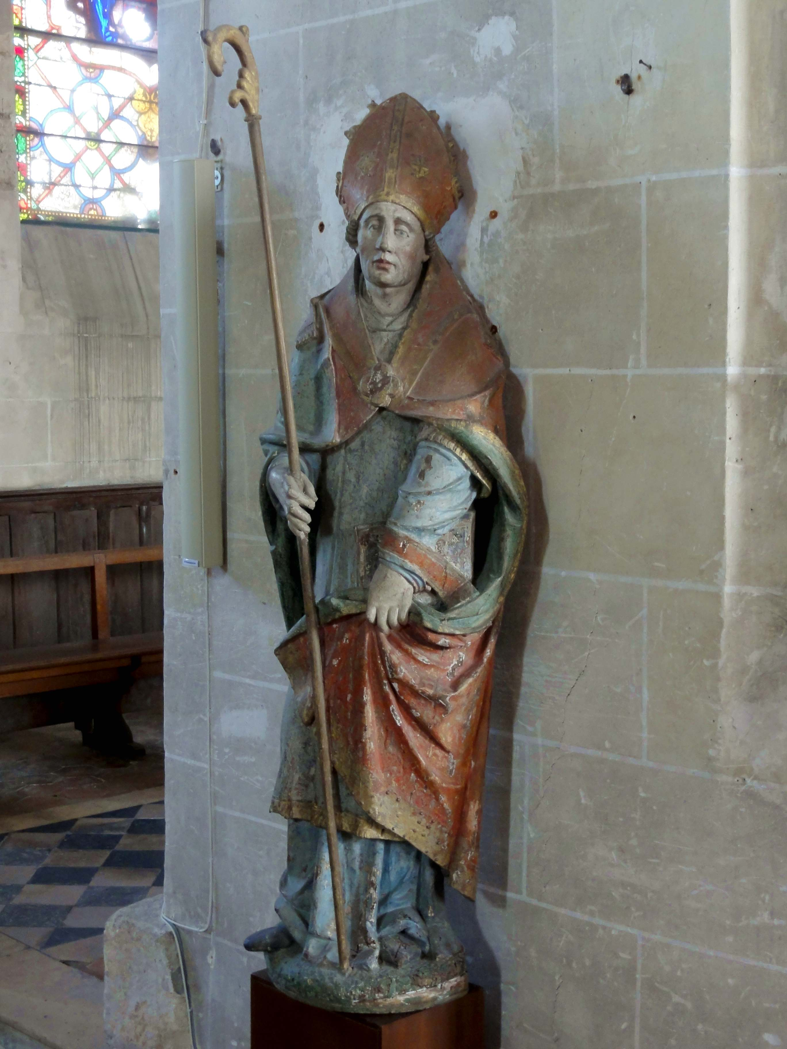 Statue de saint Martin, dernier quart du XVIIe siècle.